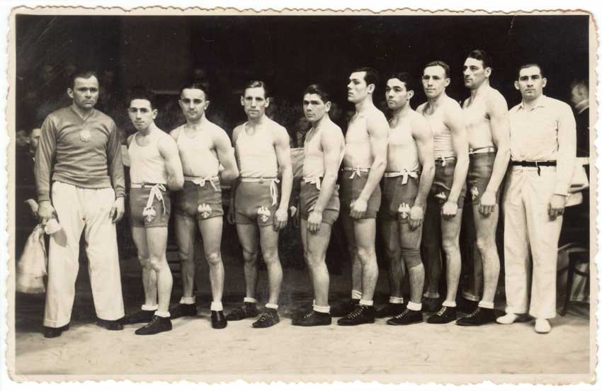 Kadra Polski na mecz bokserski z Austrią 1937; Łódź: 21.02.1937: Polska - Austria 15:1. Stoją od lewej: F. Stamm, L. Rundstein, W. Spodenkiewicz, B. Krzemiński, S. Woźniakiewicz, W. Ostrowski, H. Chmielewski, F. Szymura, S. Piłat, T. Konarzewski